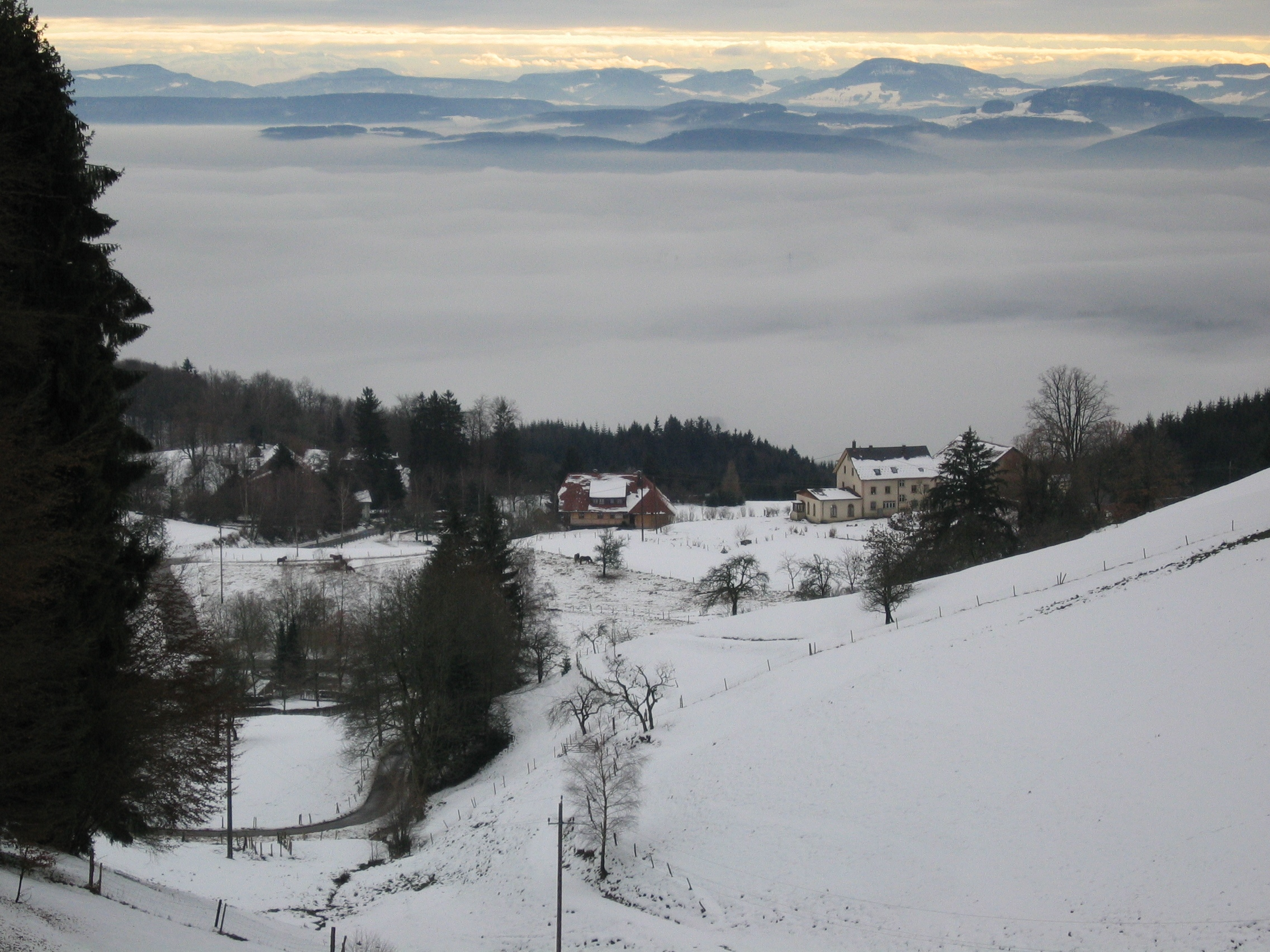 Blick auf Schweigmatt mit dem Lueginsland, dahinter Nebel über der Rheinebene, Schweizer Jura